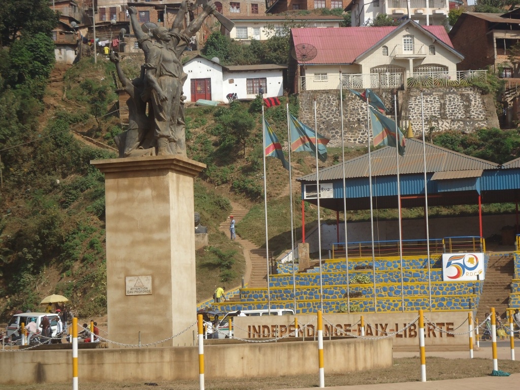 Place de l'indépendance. Grand rond-point de la ville de Bukavu